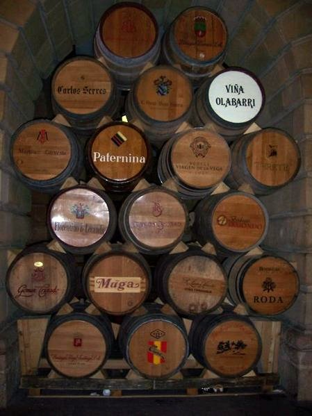 Barricas de Bodegas de Haro - La Rioja (España) colocadas en un arco del Ayuntamiento durante las Fiestas de San Juan, San Felices y San Pedro.